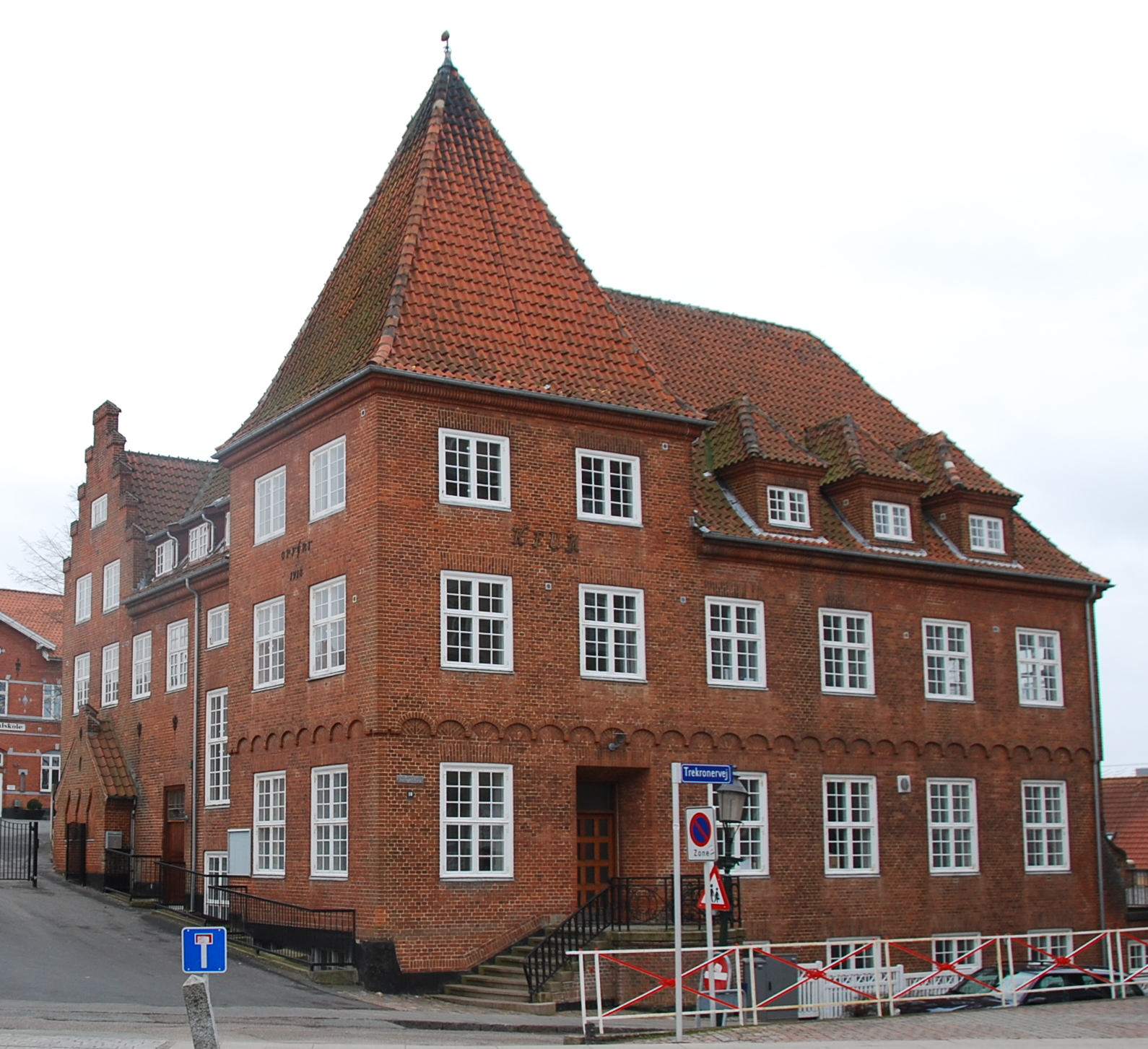 Sidebygningen på Viborg Private Realskole. Tegnet af Søren Vig-Nielsen og opført i 1913 til KFUM.